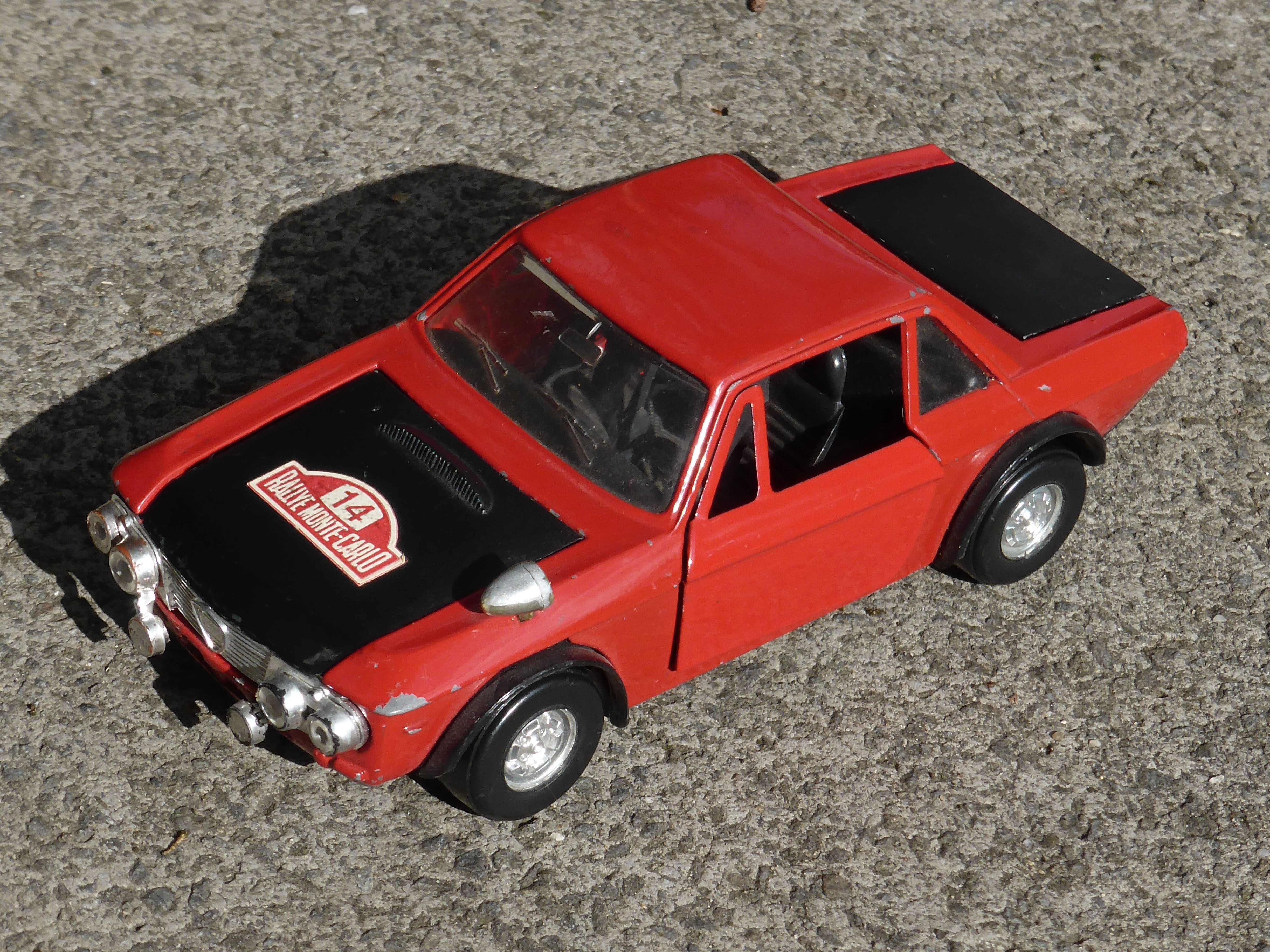 Modellauto "Lancia Fulvia 1600 HF" von Polistil im Maßstab 1:15